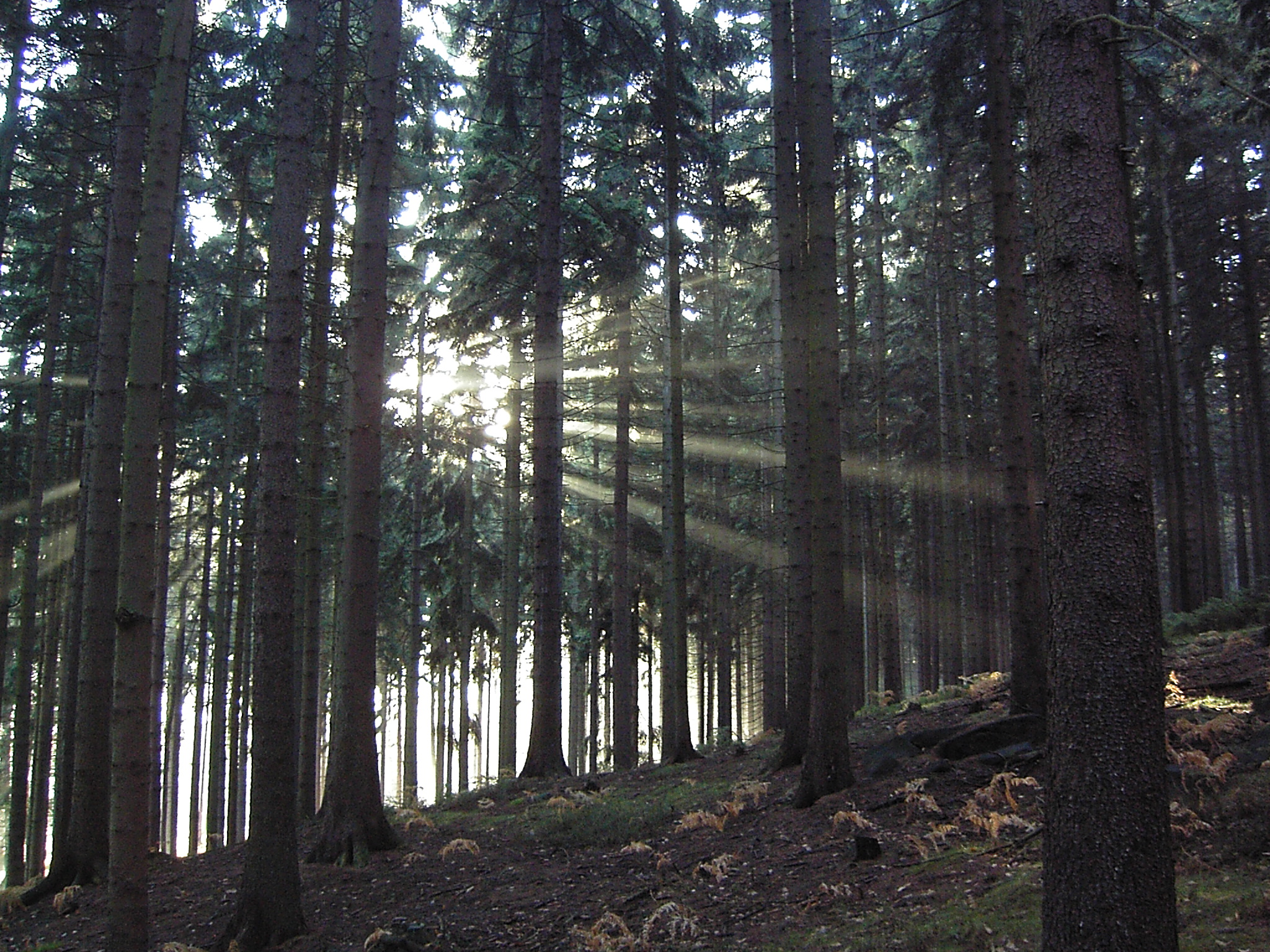 Tanečnice, Mikulášovice, lesní porost na jižních svazích